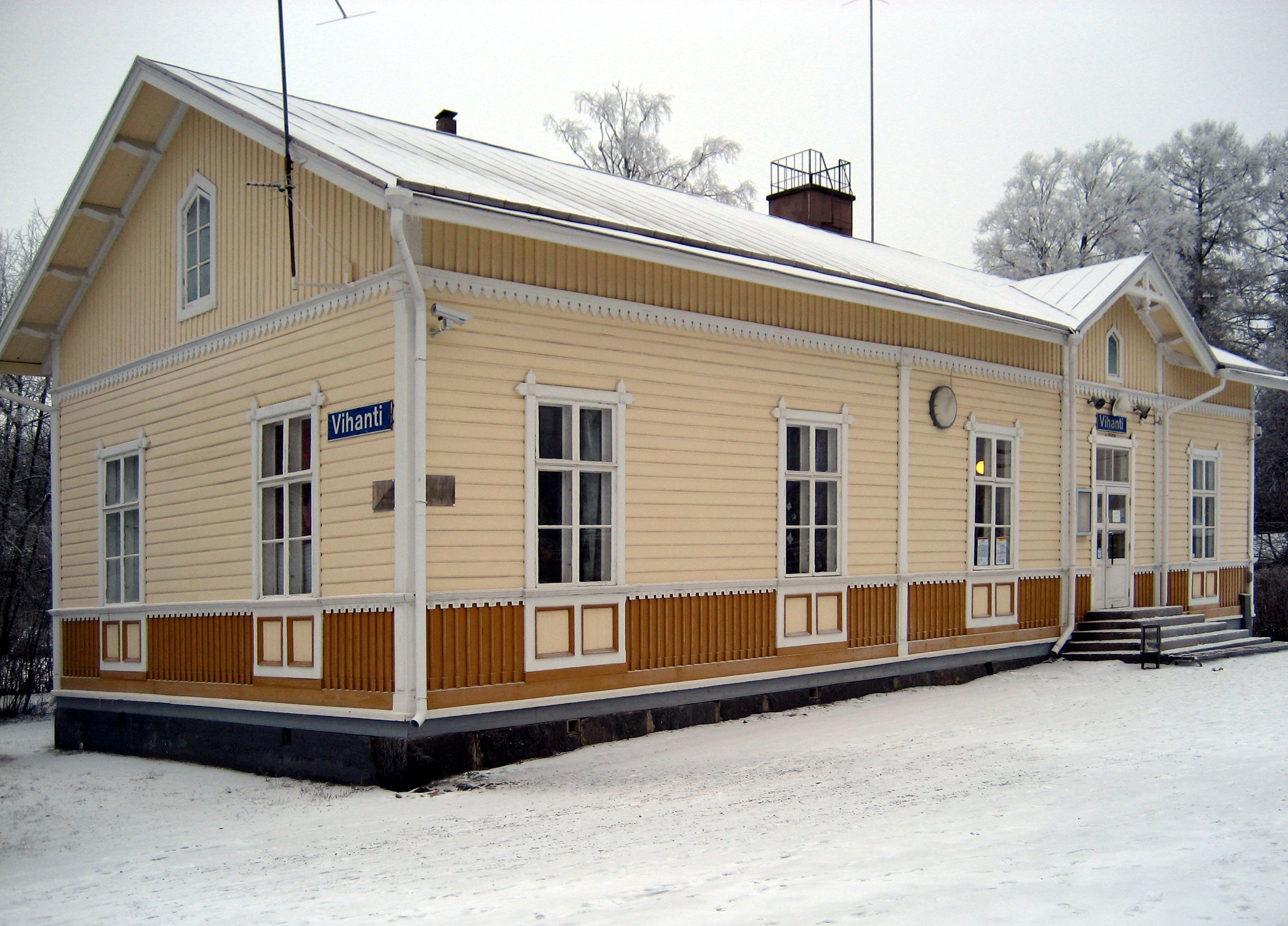 Vihannin rautatieasema 2007